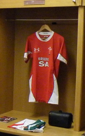 ystafell newid